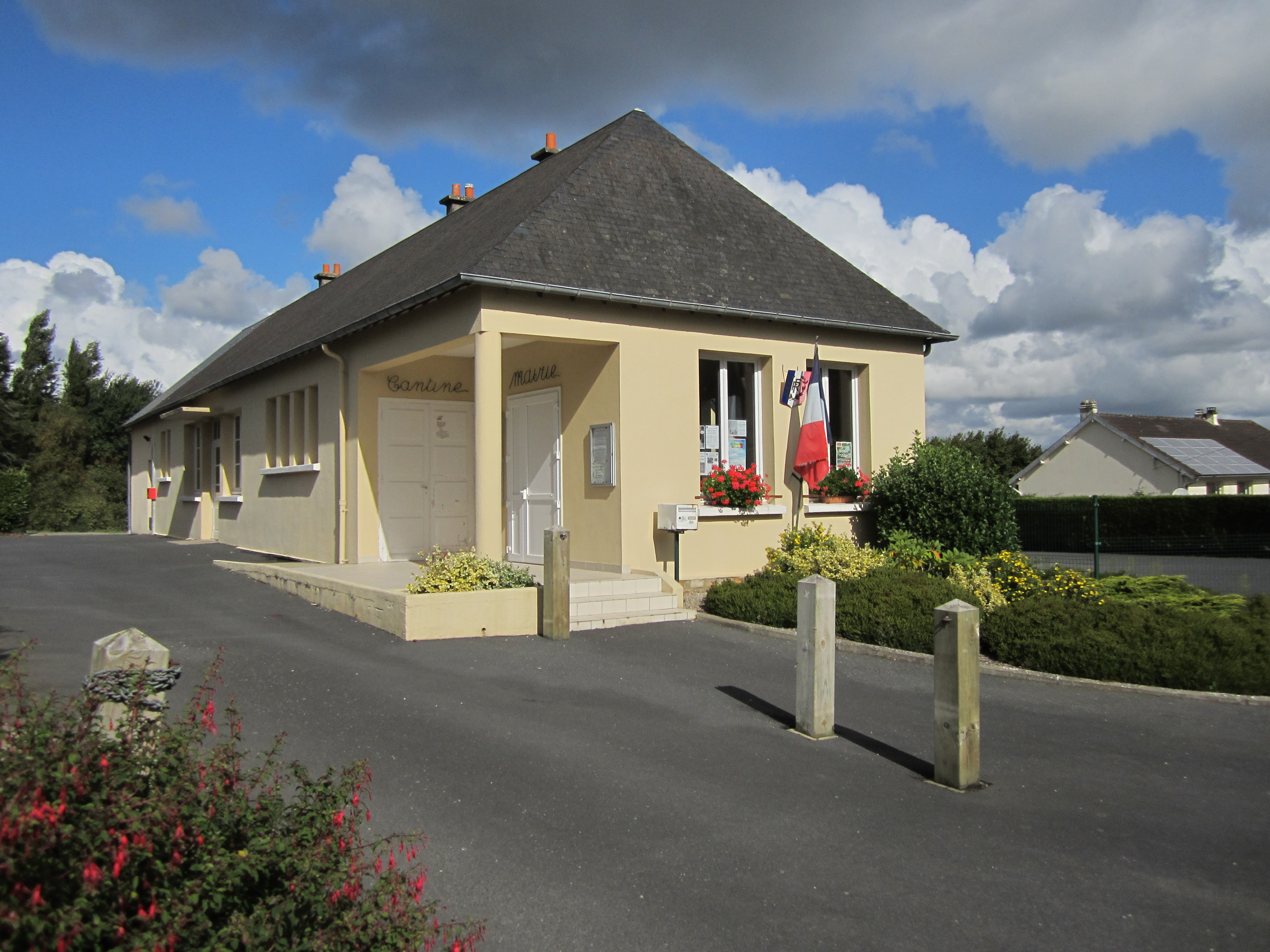 Église Saint-Pierre de Prétot, Manche